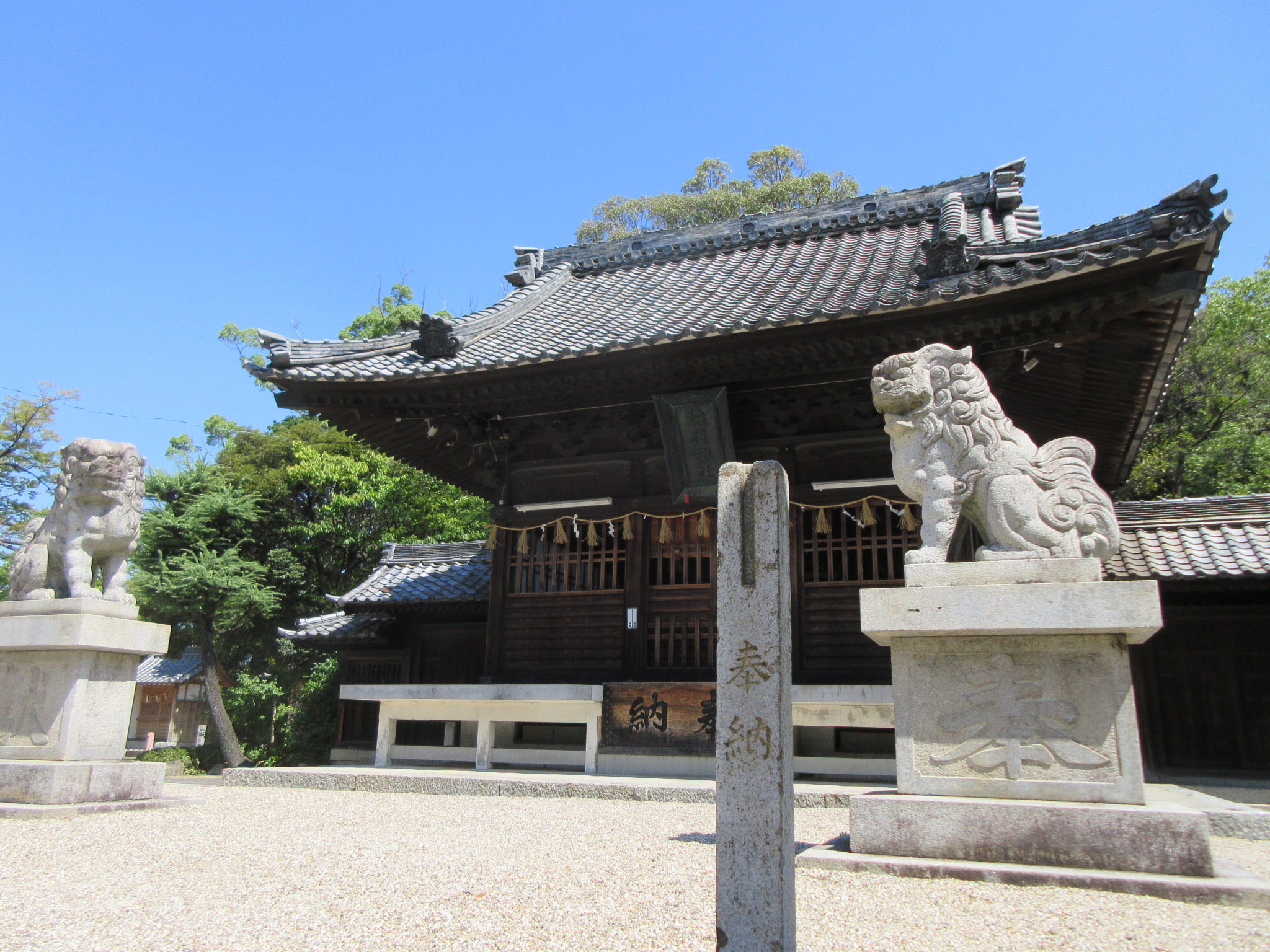 稲荷神社（岡崎市羽根西）